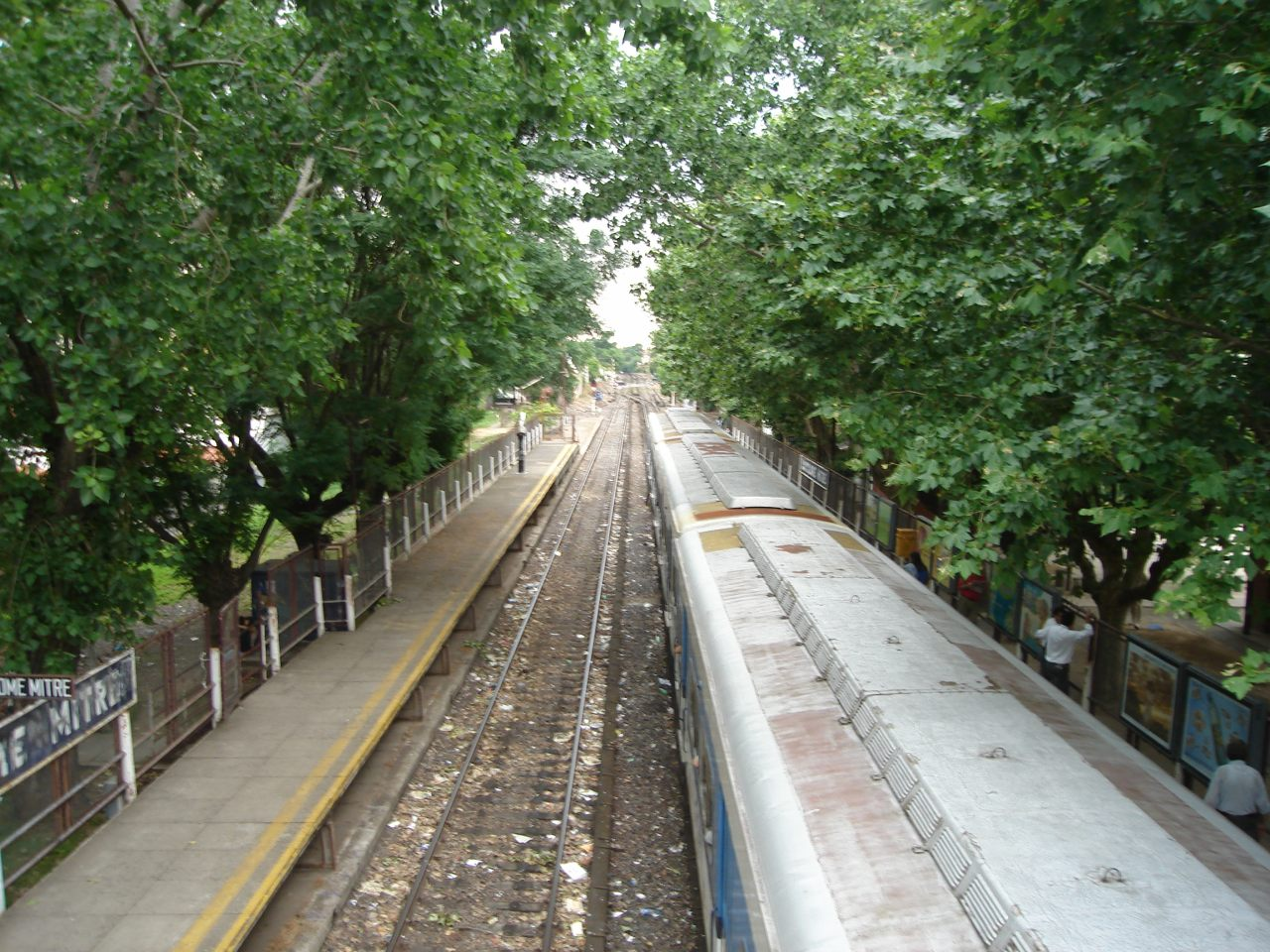 Vista de una formación detenida en la estación Bartolomé Mitre, terminal del ramal homónimo del ferrocarril del mismo nombre.